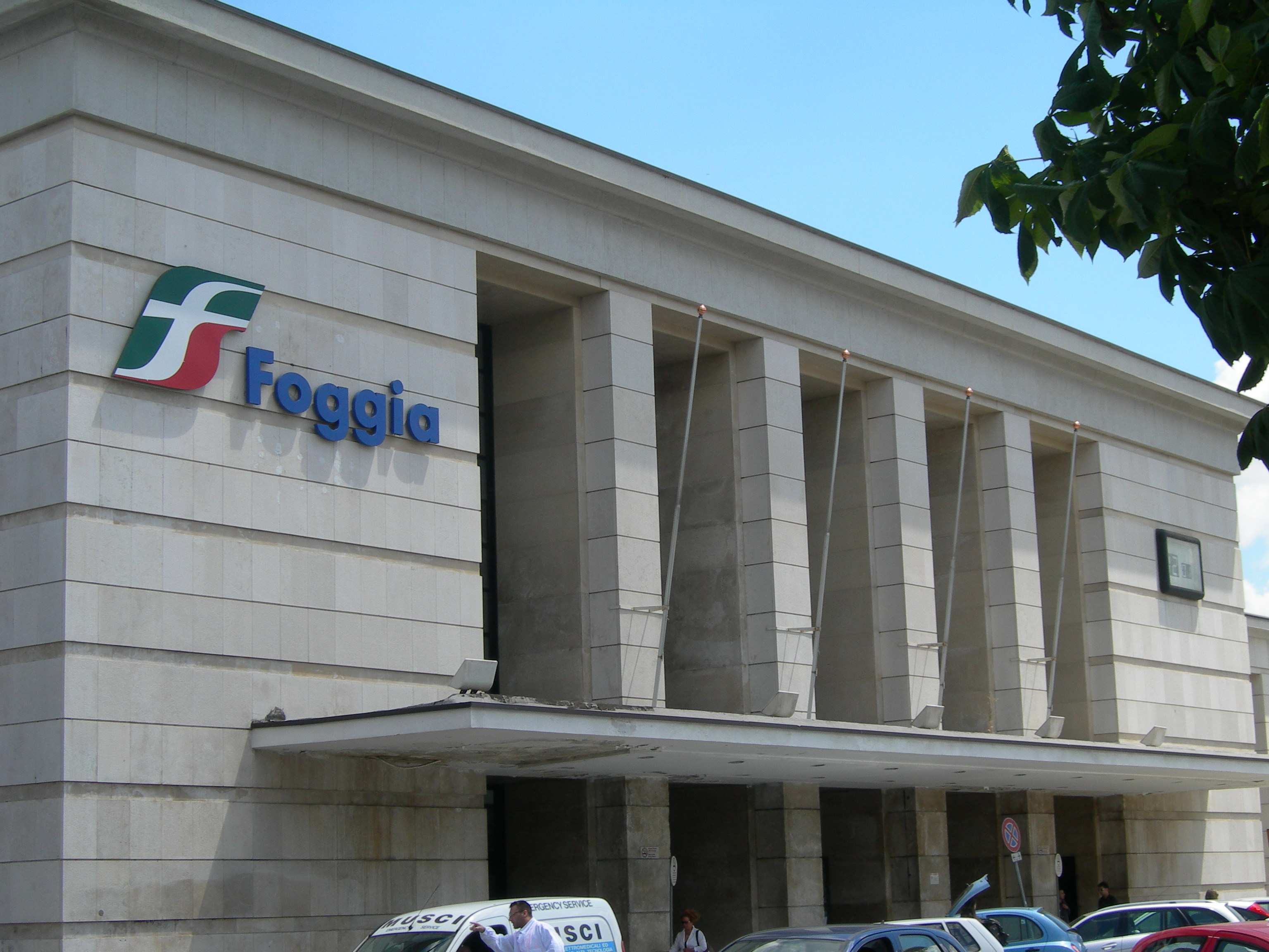 la stazione ferroviaria di Foggia